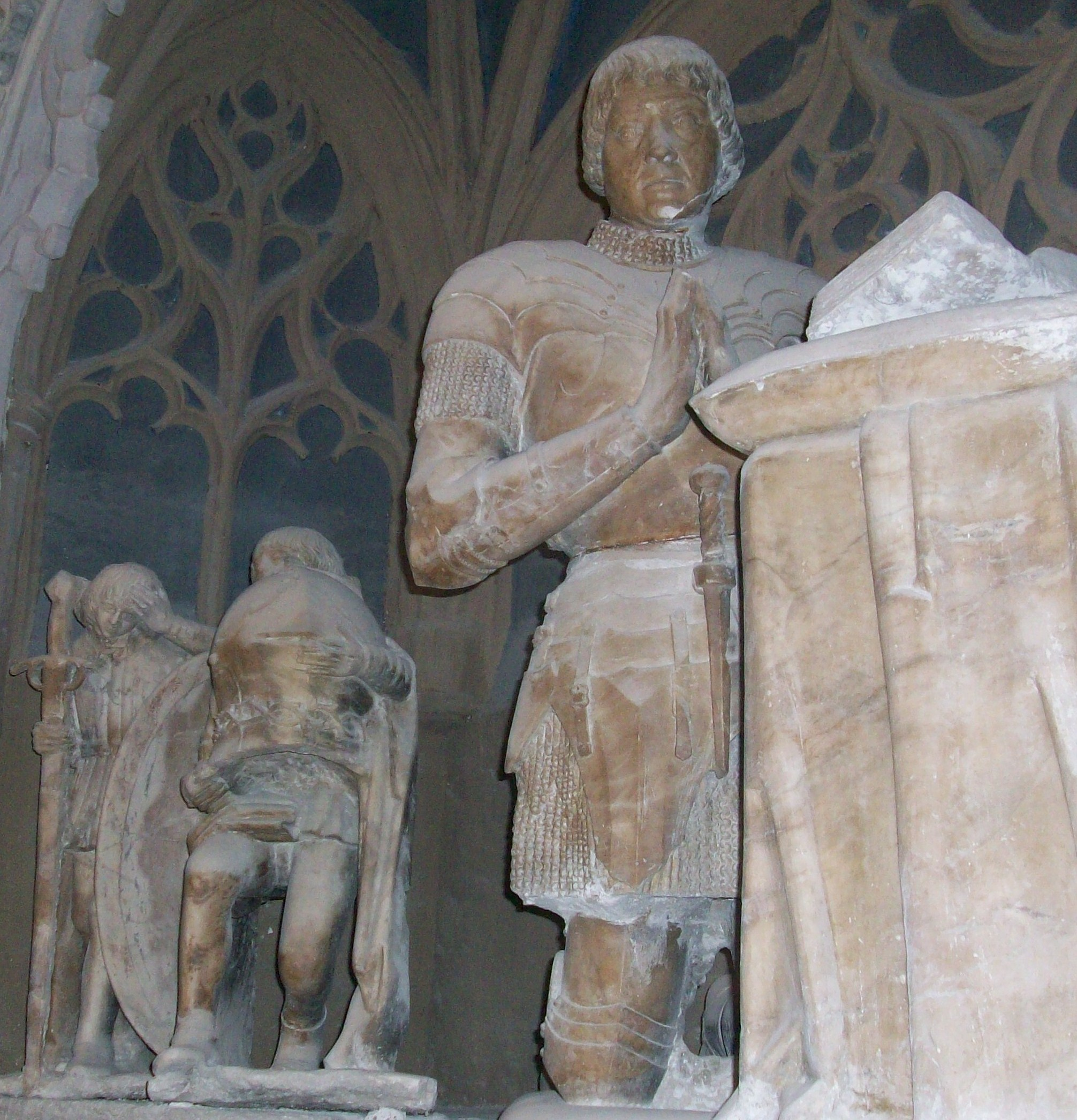 Sepulcro de Pedro Vázquez de Acuña, primer conde de Buendía y fallecido en 1482, en la capilla mayor de la iglesia de Ntra. Sra. de la Asunción de Dueñas, provincia dePalencia, (España).